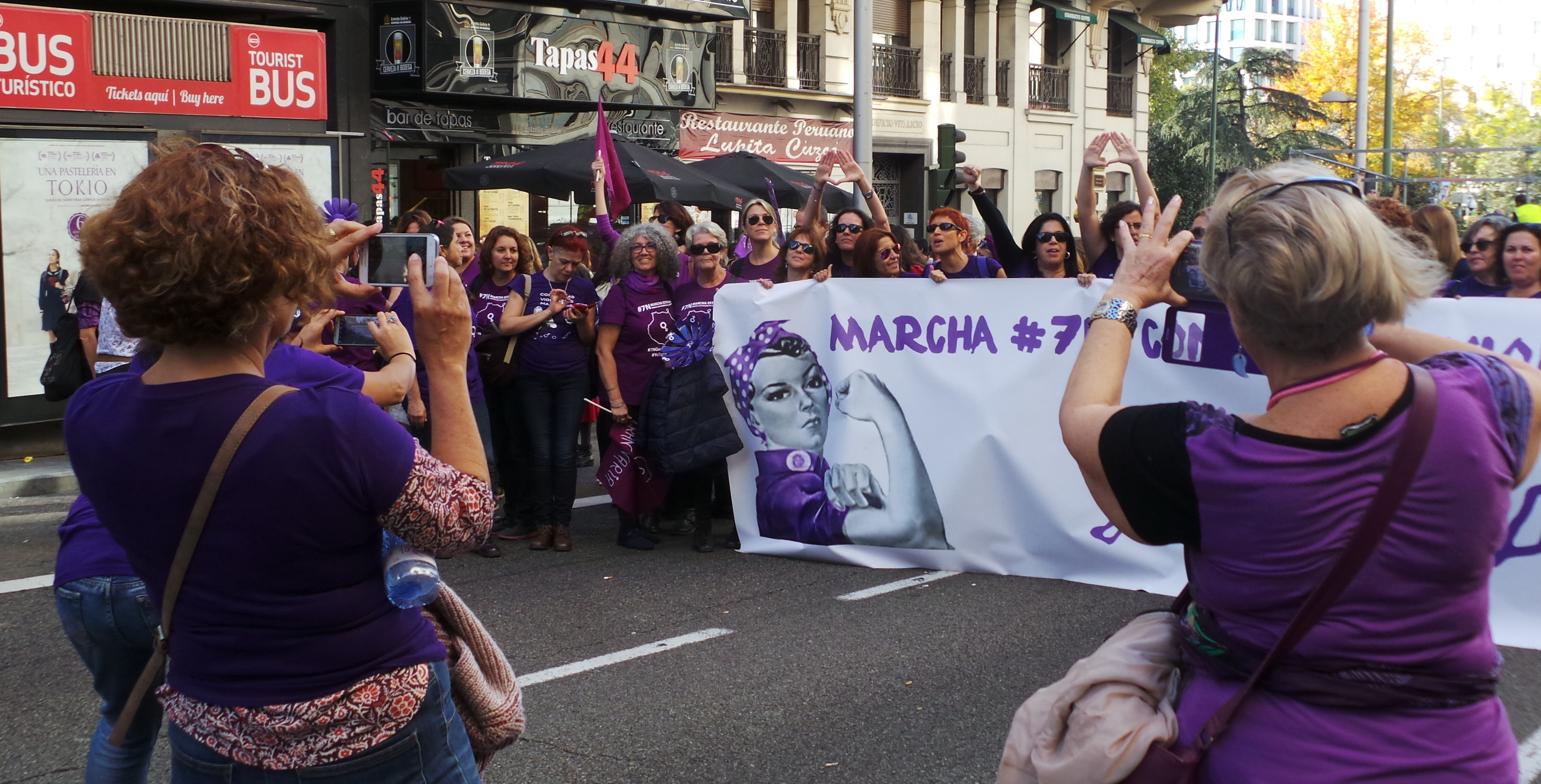 En la Marcha Estatal contra las violencias machistas. Gran Vía. Madrid 7N 2015